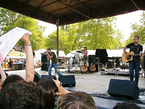 Ken Zazpi, euskal taldeak 2006eko Herri urratsen.